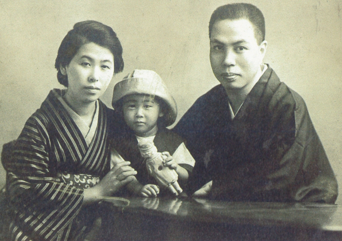 Keizō Muraoka (村岡儆三, Japanese, *1887, †1963) and Hanako Muraoka (村岡花子, Japanese, *1893, †1968))